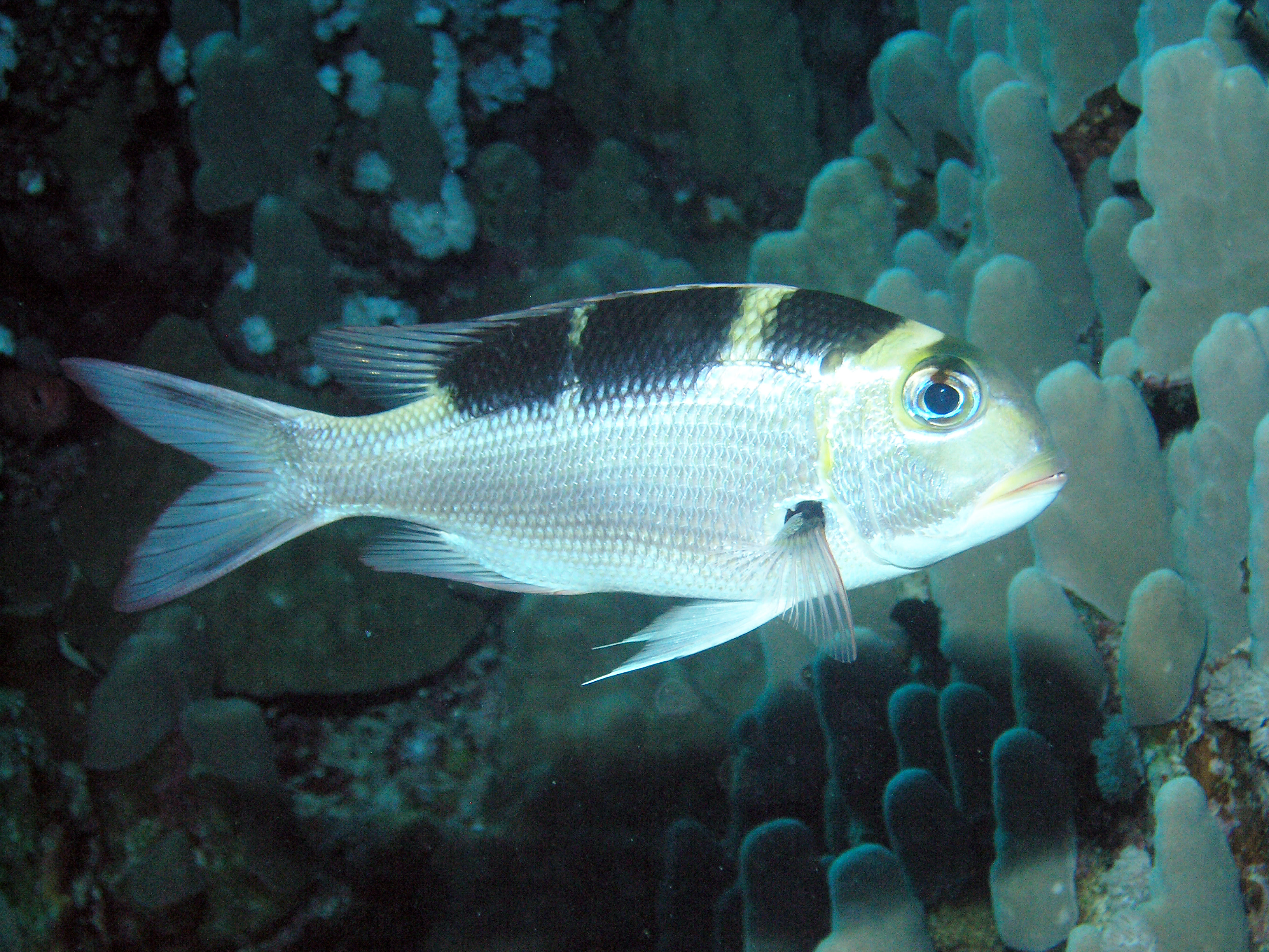 Großaugen-Schnapper (Monotaxis grandoculis)